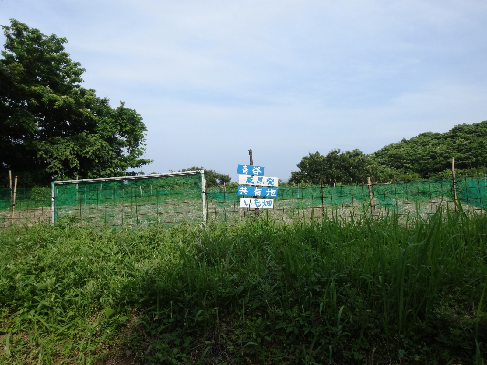 鳥取市青谷の長尾鼻にある反原発共有地のいも畑